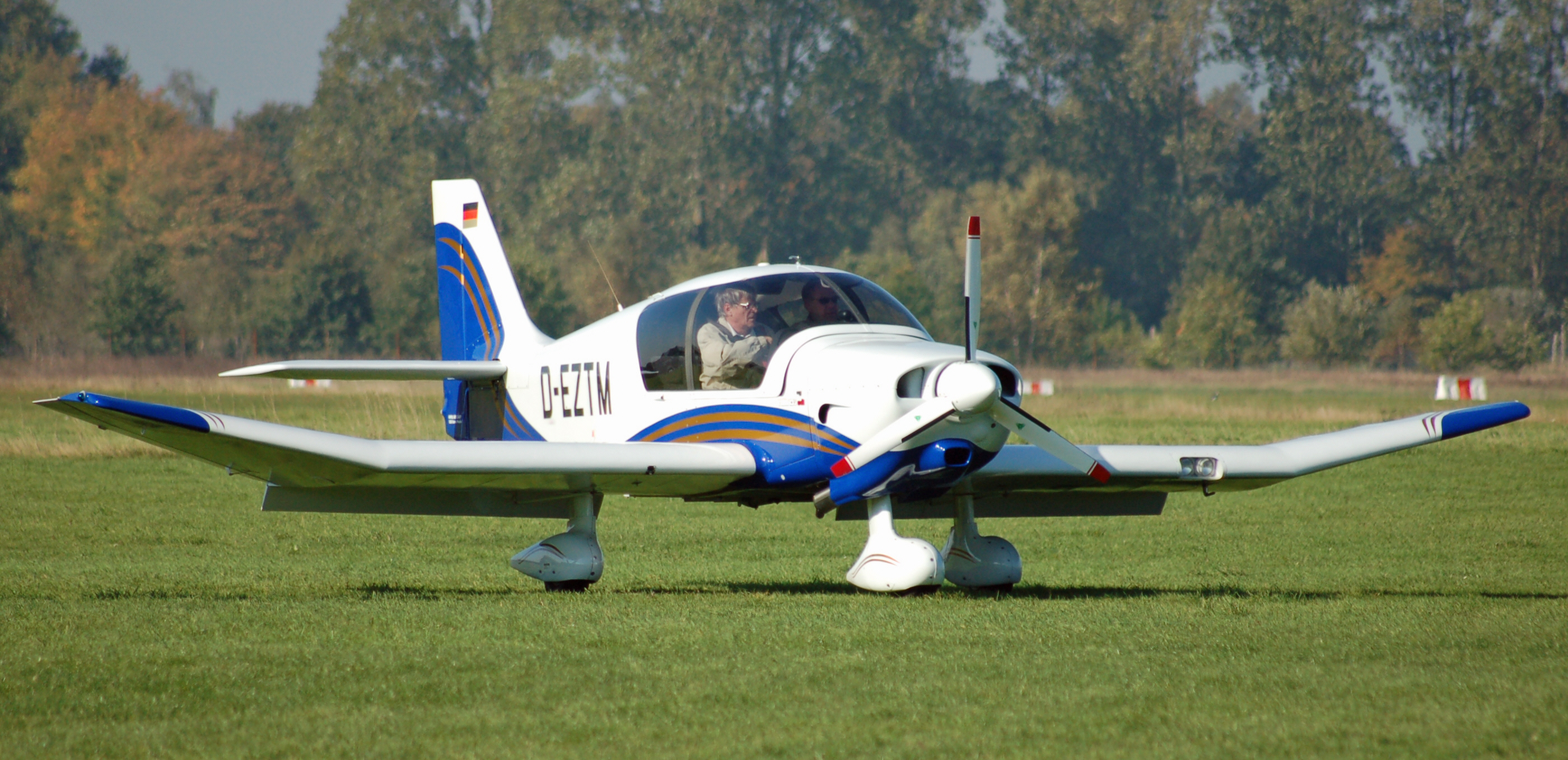 Robin DR400 Ecoflyer (D-EZTM) auf dem Flugplatz Uetersen